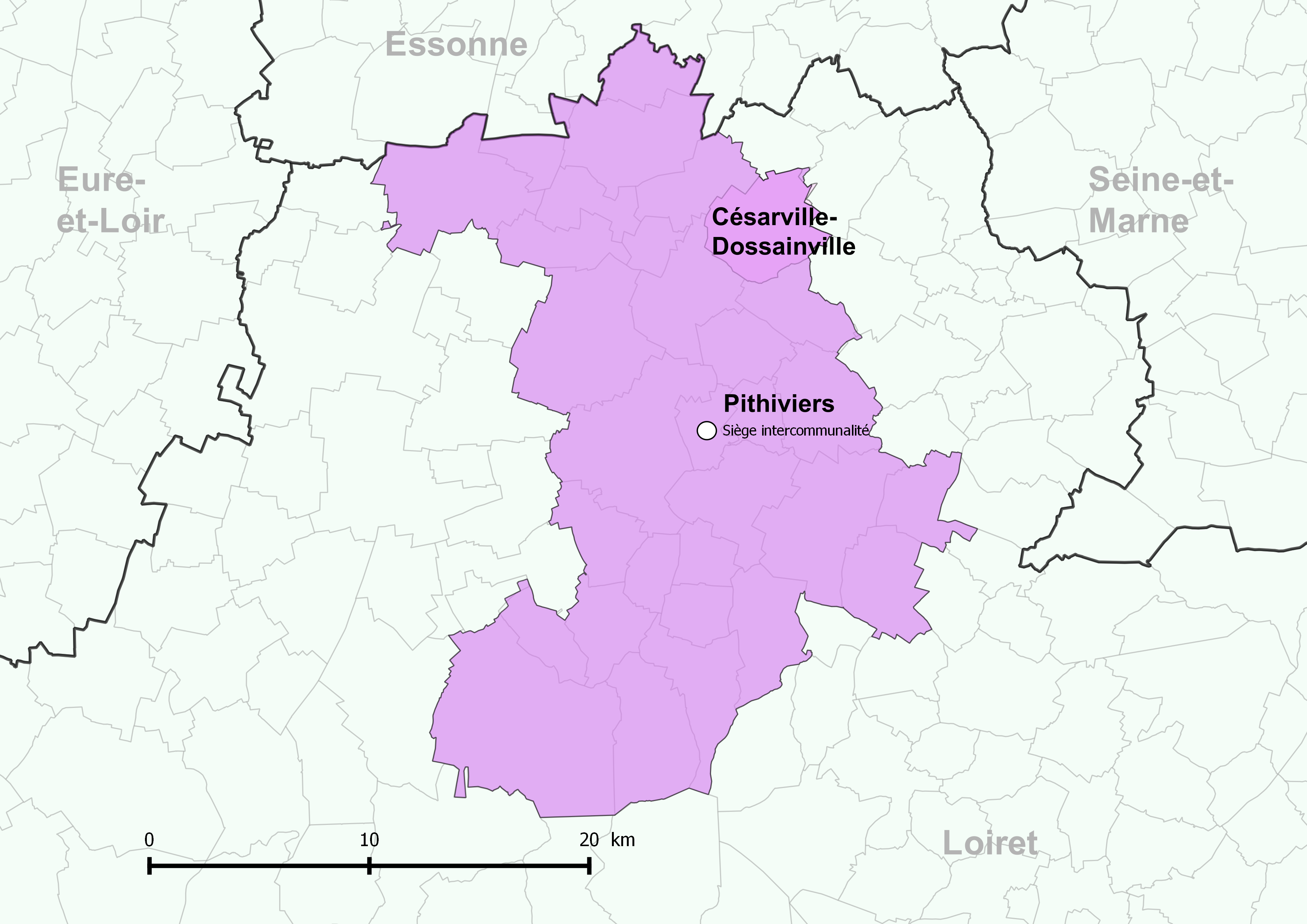 Périmètre de la communauté de communes du Pithiverais - Positionnement de la commune de Césarville-Dossainville.